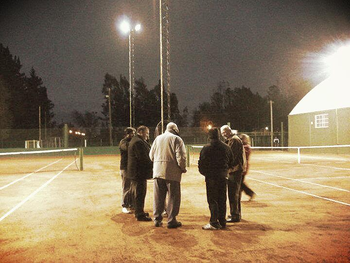 Día de inaguración.